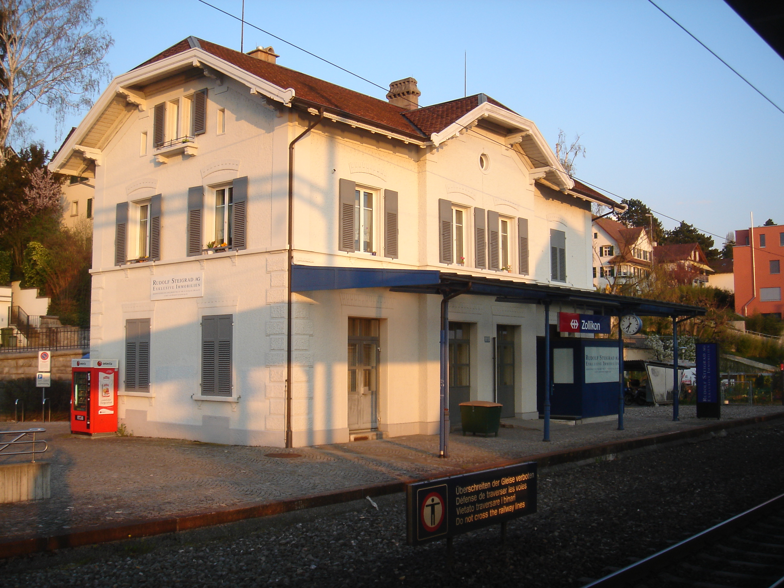 Bahnstation Zollikon ZH auf der rechtsufrigen Zürichseebahn